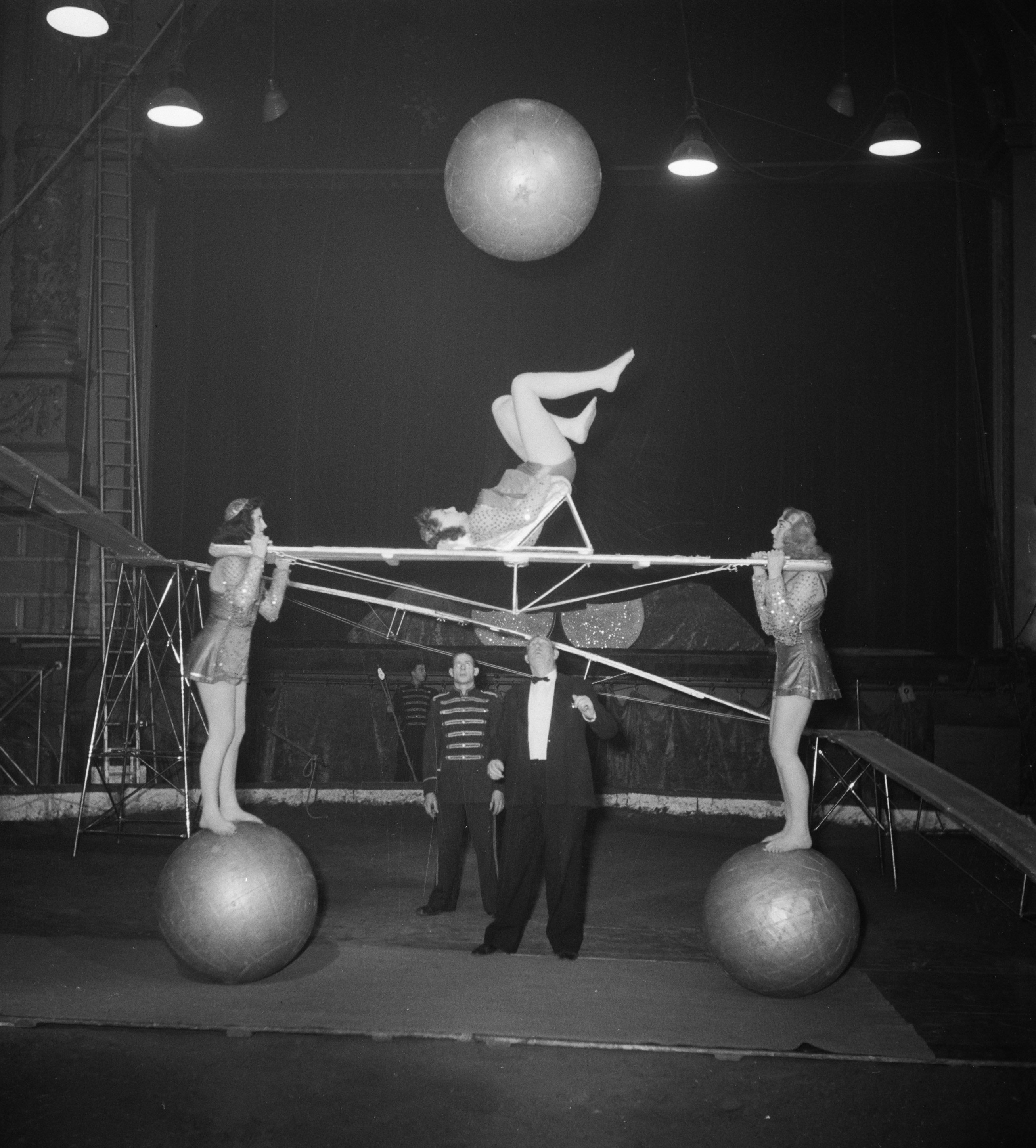 Collectie / Archief : Fotocollectie Anefo Reportage / Serie : [ onbekend ] Beschrijving : Circus Strassburger diverse opnamen Datum : 22 januari 1952 Trefwoorden : OPNAMEN Instellingsnaam : Strassburger Circus Fotograaf : Noske, J.D. / Anefo Auteursrechthebbende : Nationaal Archief Materiaalsoort : Negatief (zwart/wit) Nummer archiefinventaris : bekijk toegang 2.24.01.03 Bestanddeelnummer : 904-9390